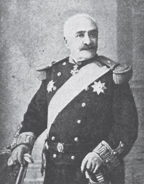 griechischer Militär, 19. Jahrhundert